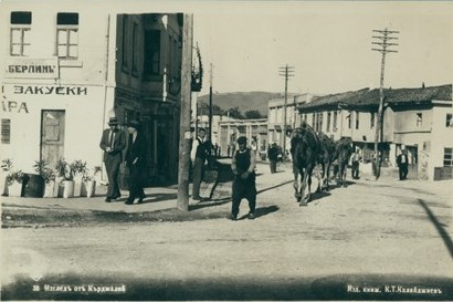 Изглед от Кърджали, 1939 г.